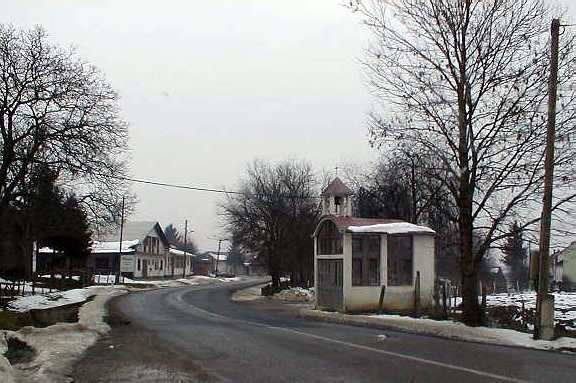 centar sela Vrboveckog Pavlovca